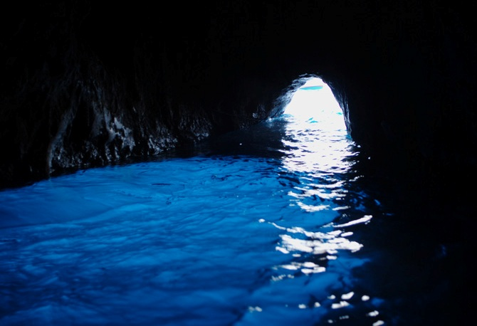 Grotta azzurra, Capri, Italy